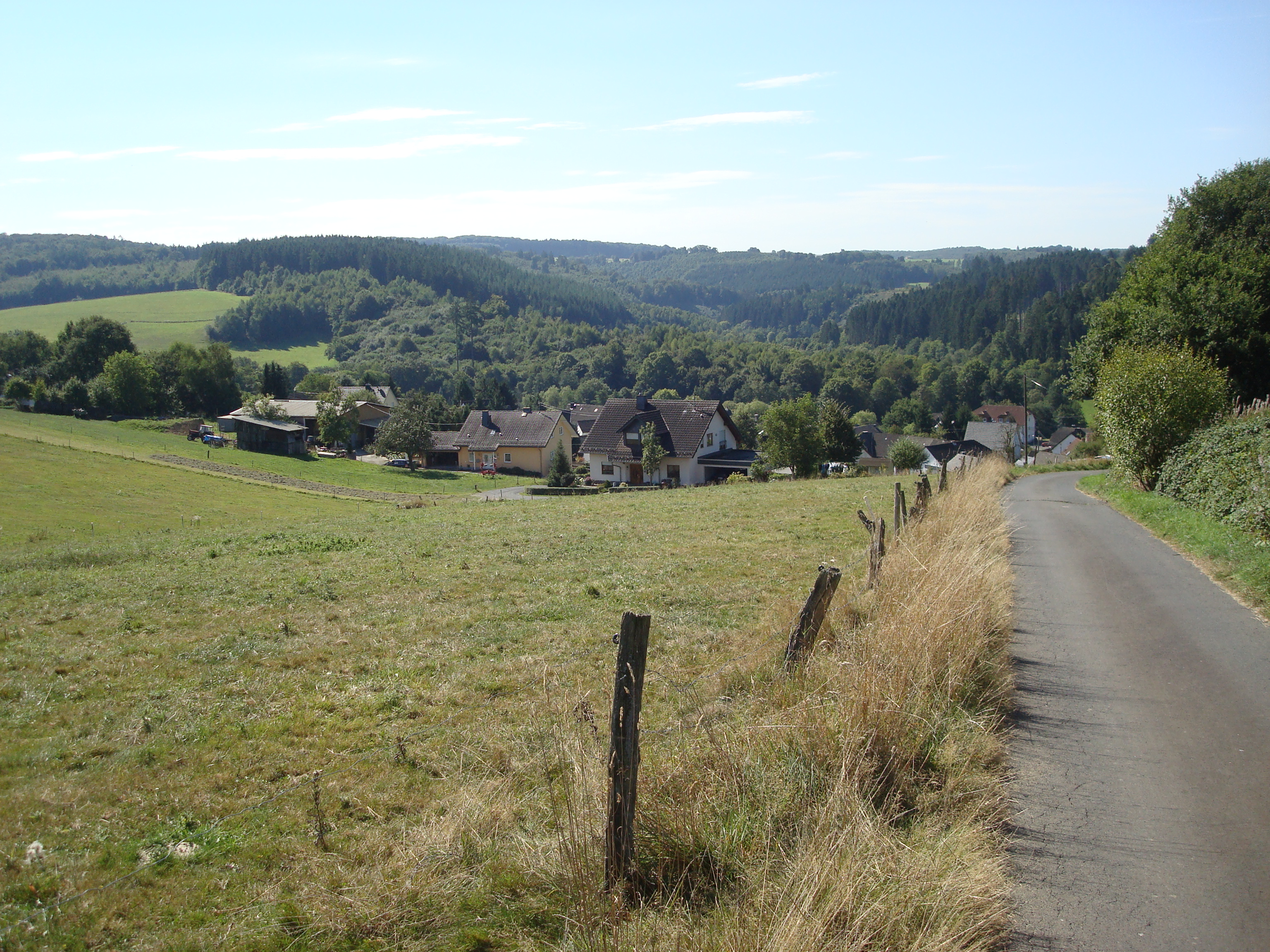 Kausen